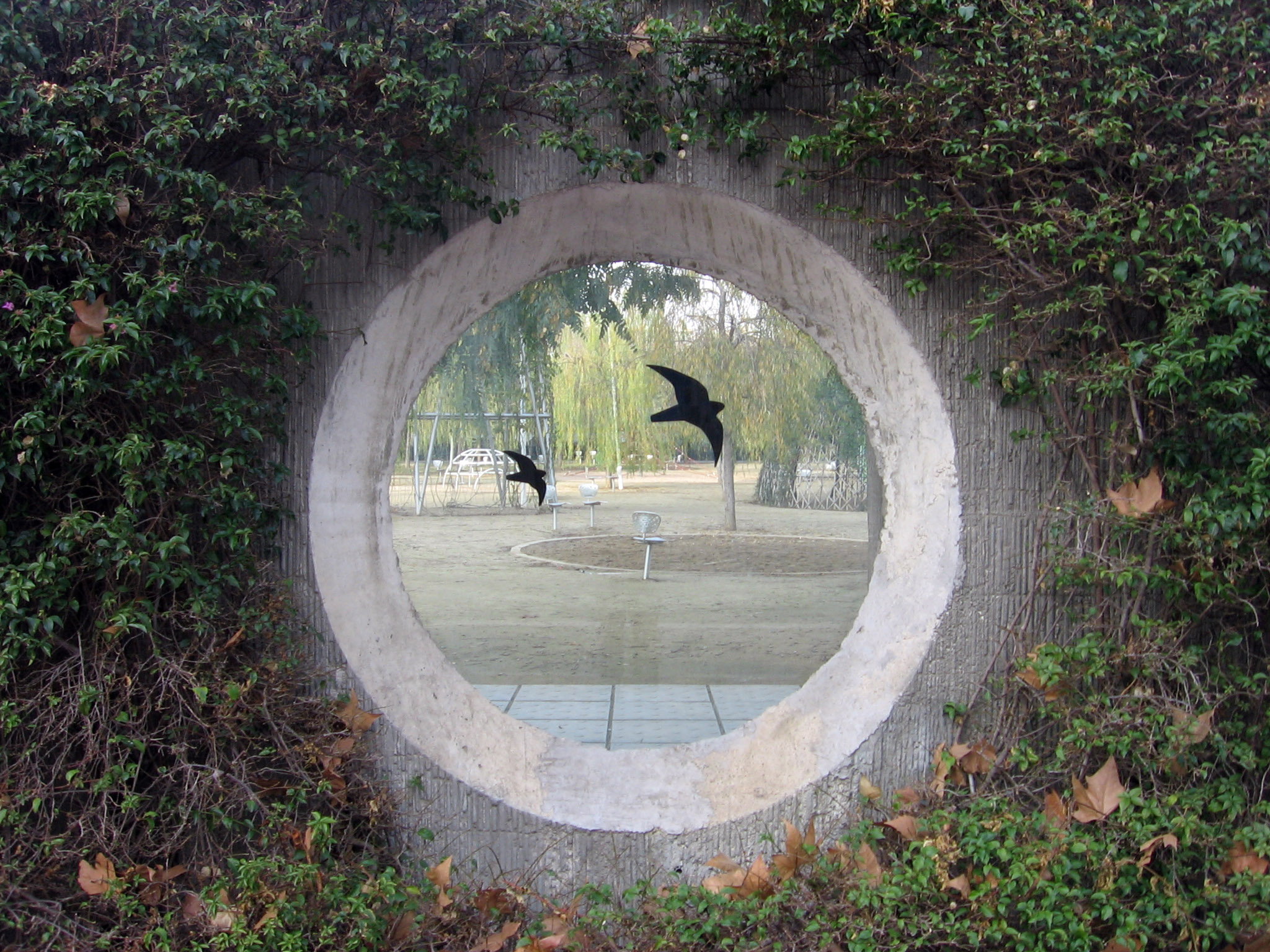 Parque del Centre del Poblenou.